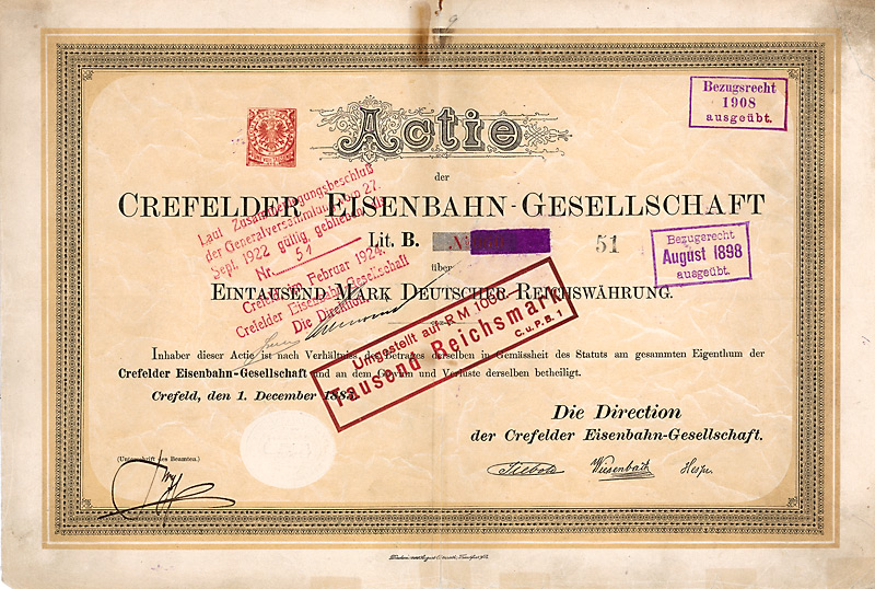 Aktie über 1000 Mark der Crefelder Eisenbahn-Gesellschaft vom 1. Dezember 1885